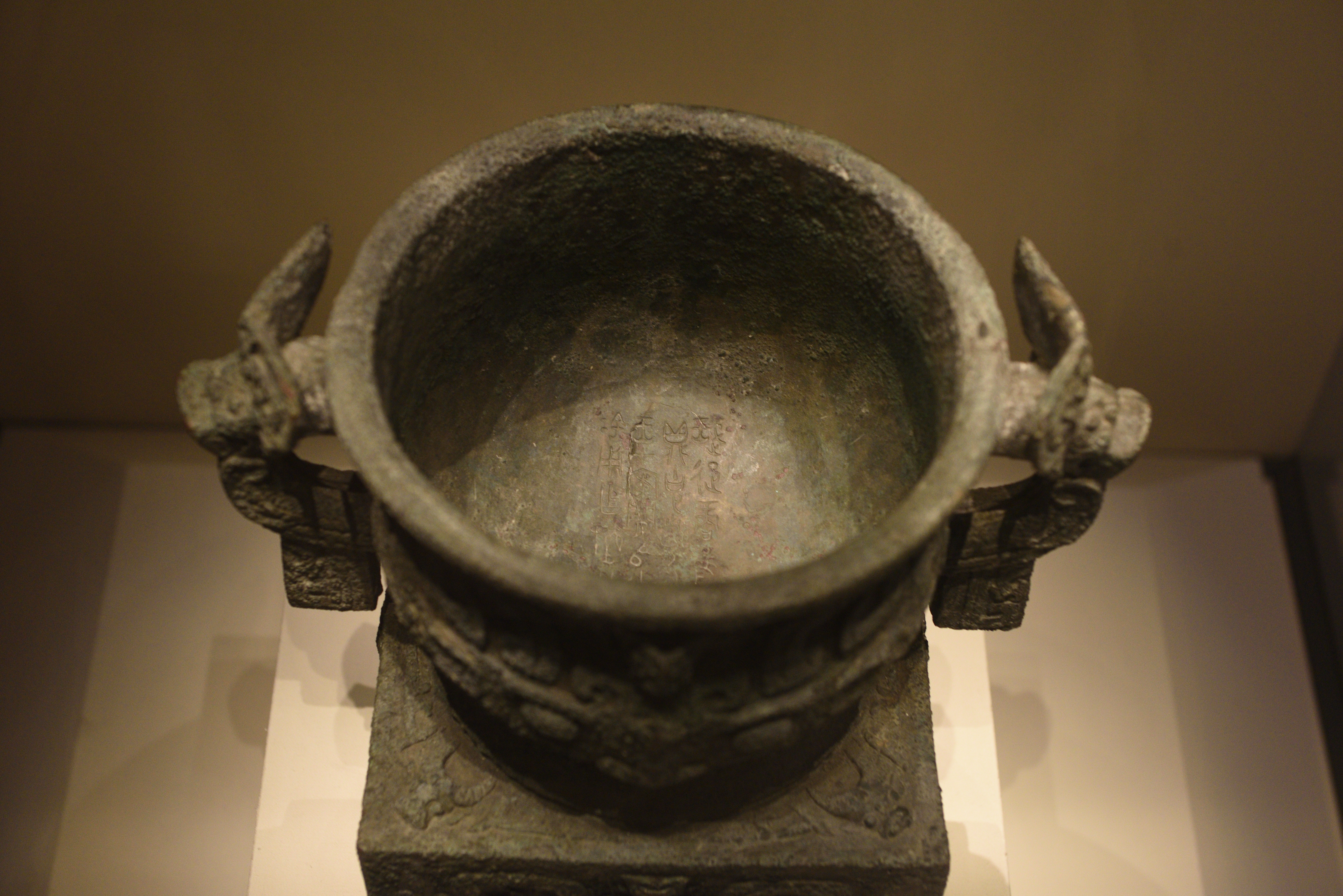 中国国家博物馆藏利簋铭文